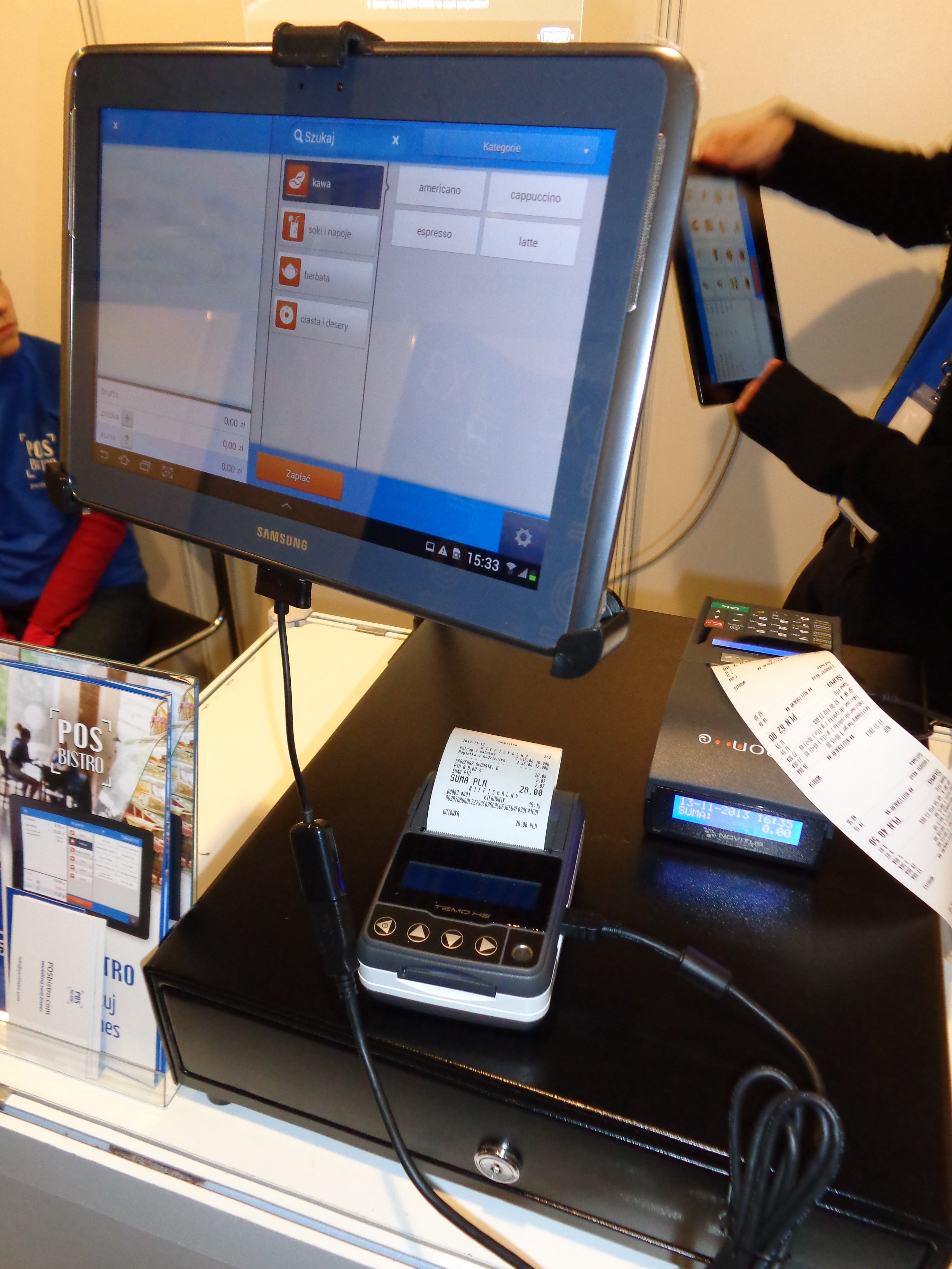 System terminala POS działającego na bazie tabletu prezentowany podczas Targów HORECA 2013 w Krakowie.